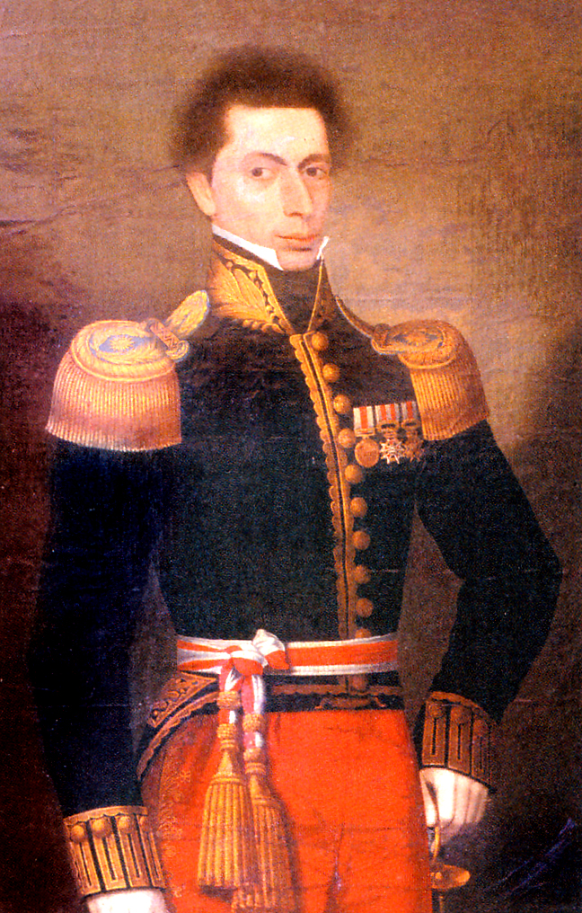 Pedro Bermúdez (1792-1853) militar peruano, jefe supremo del Perú en 1834.